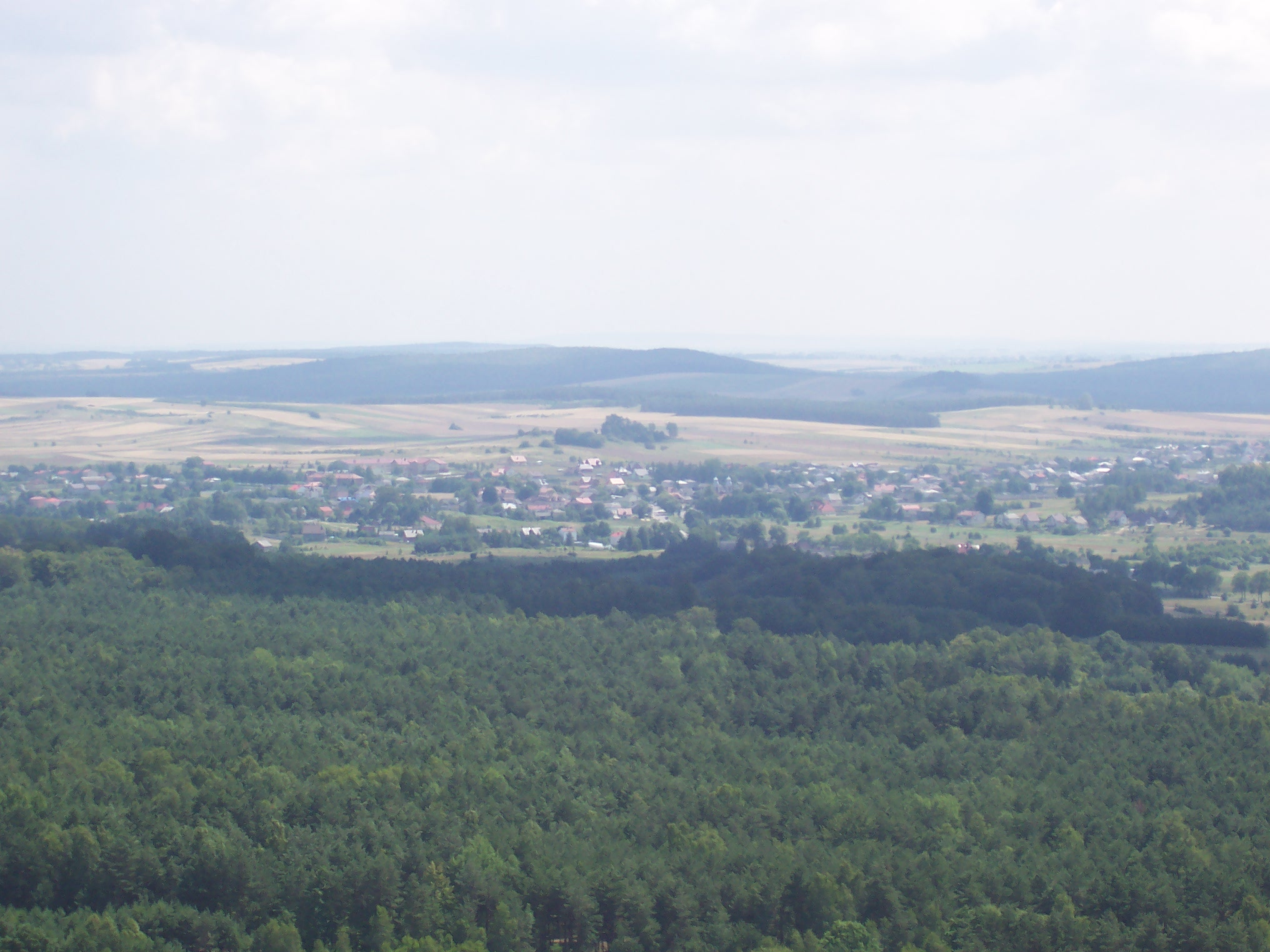 Góra Zborów